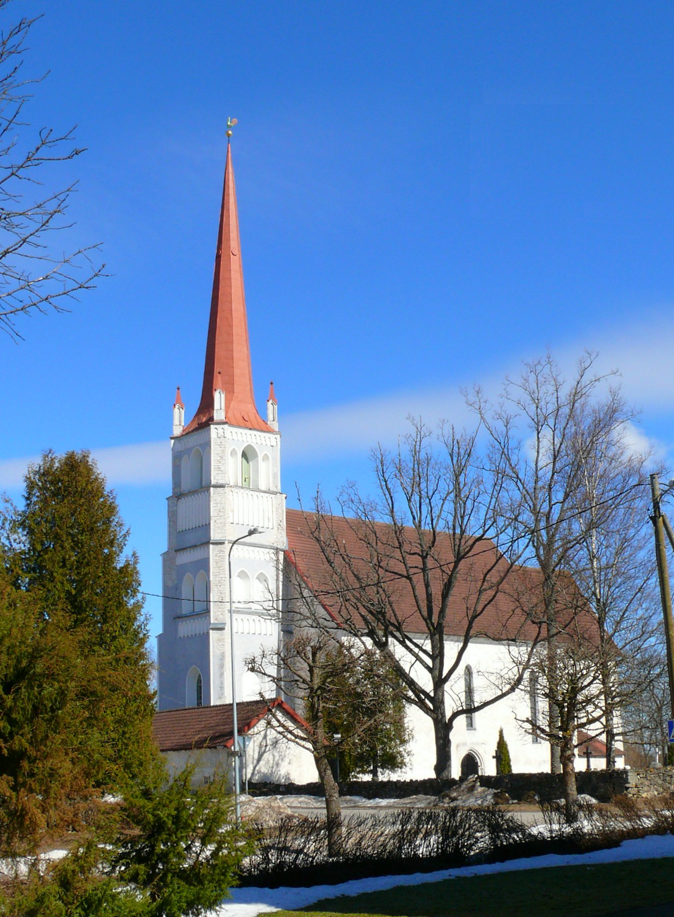 Türi kirik.